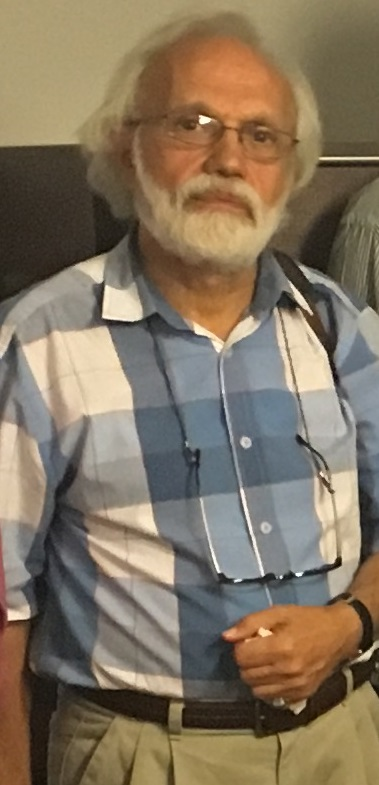 اسماعیل تهرانی (موسیقیدان) خانه سینمای ایران ۱۳ مرداد ۱۳۹۵